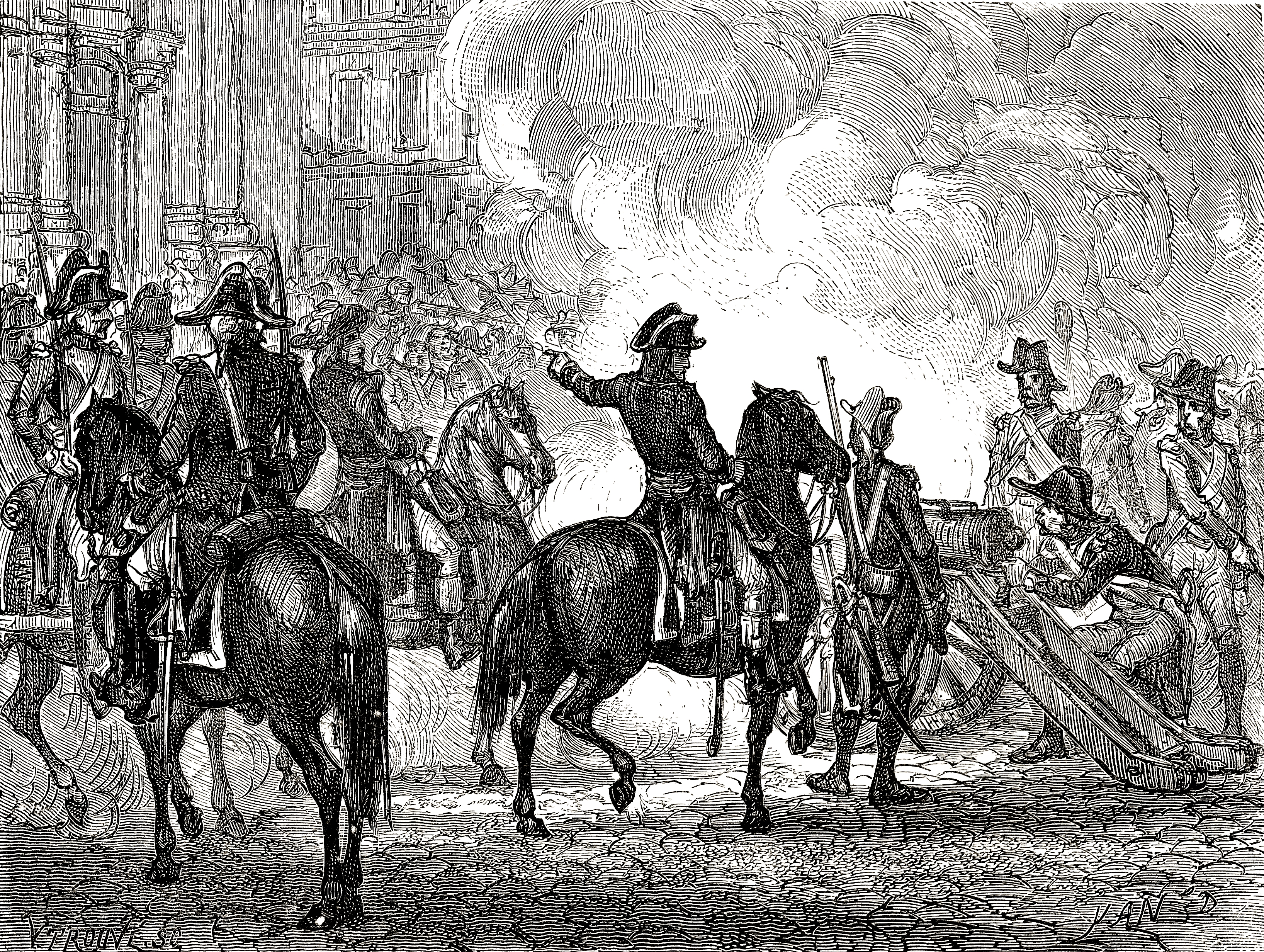 Bonaparte fait tirer à mitraille sur les sectionnaires. Le 13 vendémiaire an IV (5 octobre 1795), le général Bonaparte fait tirer sur les insurgés royalistes, sur les marches de l'Eglise Saint-Roch à Paris.